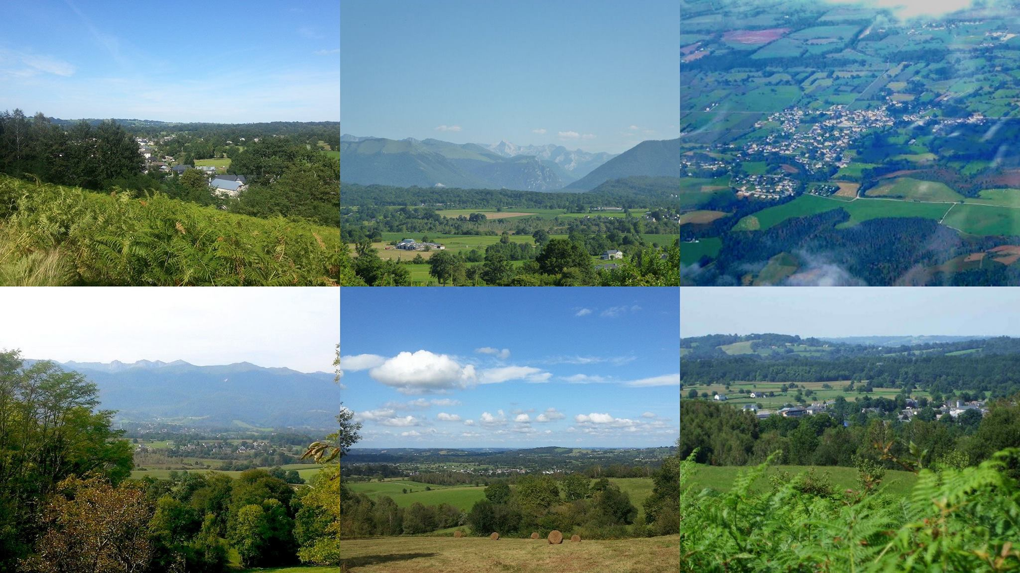 Diverses vues de Buzy en Béarn